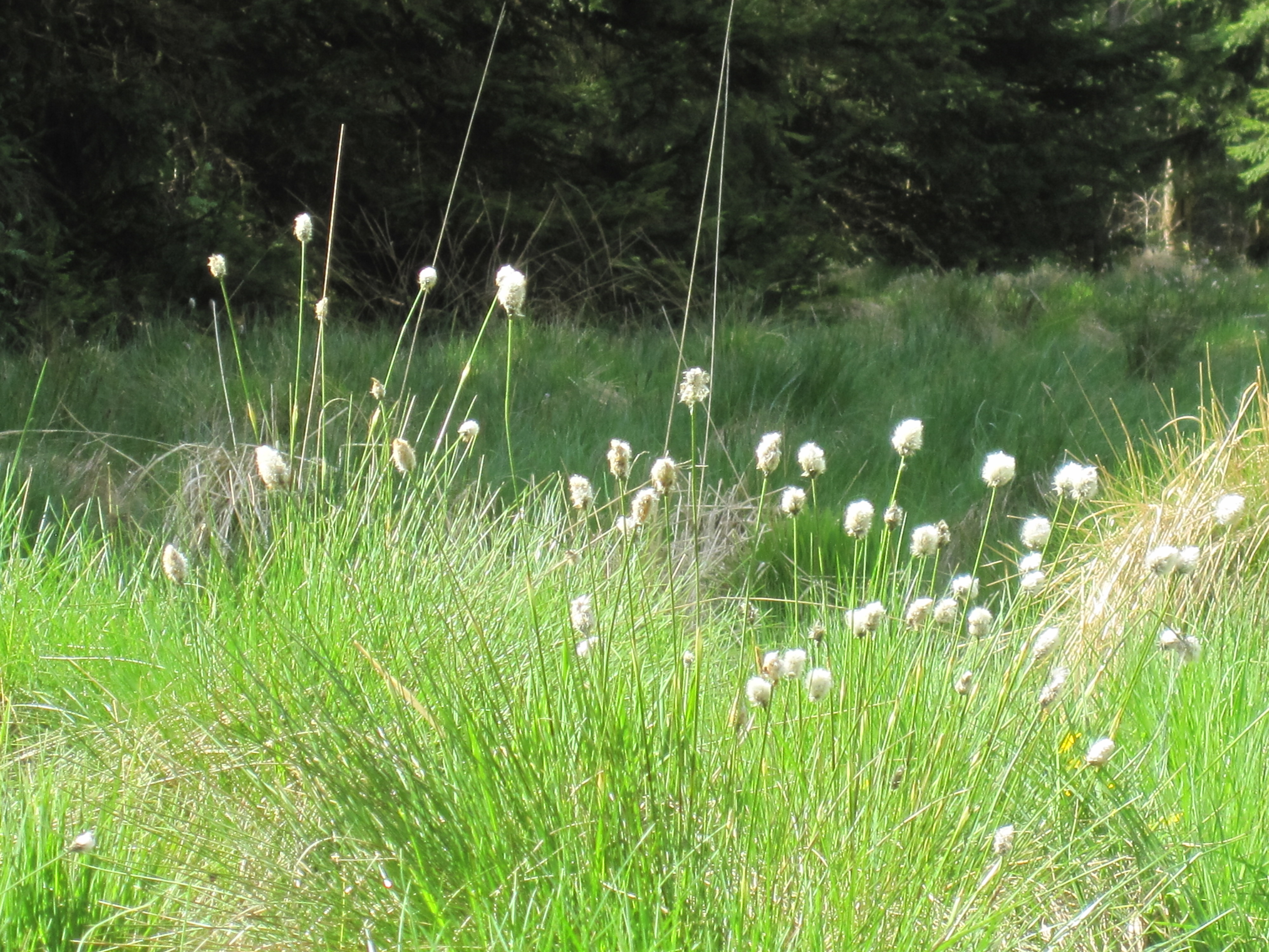 Das Naturschutzgebiet Moore südlich von Schönheide entstand 2013 durch eine Verordnung des Erzgebirgskreises. Baumgärtels-Kiefern.